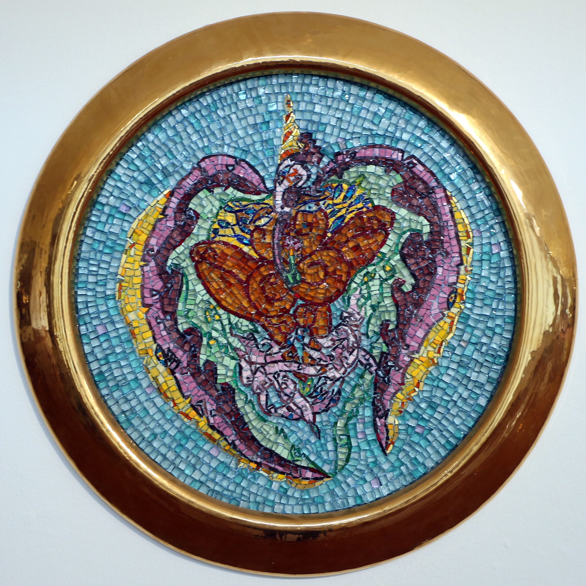 Collezione Mosaici Moderni - NB: Museum explicitly authorized the upload of its contemporary art collection for WLM 2016 (for further info ask WLM Italy organizators). This is a photo of a monument which is part of cultural heritage of Italy.